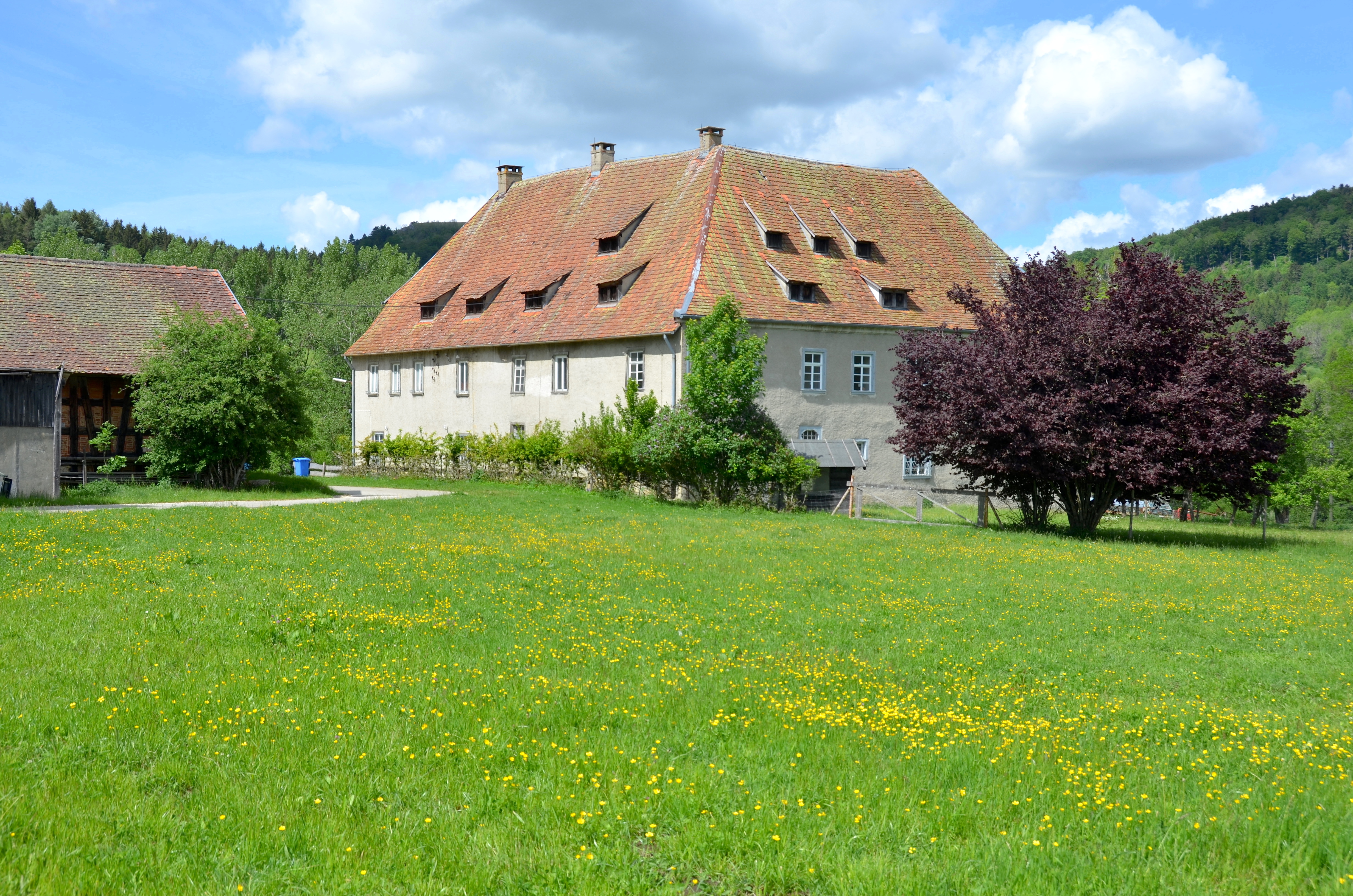 Hofgut Oberhausen (ehem. Schloss) bei Hausen am Tann